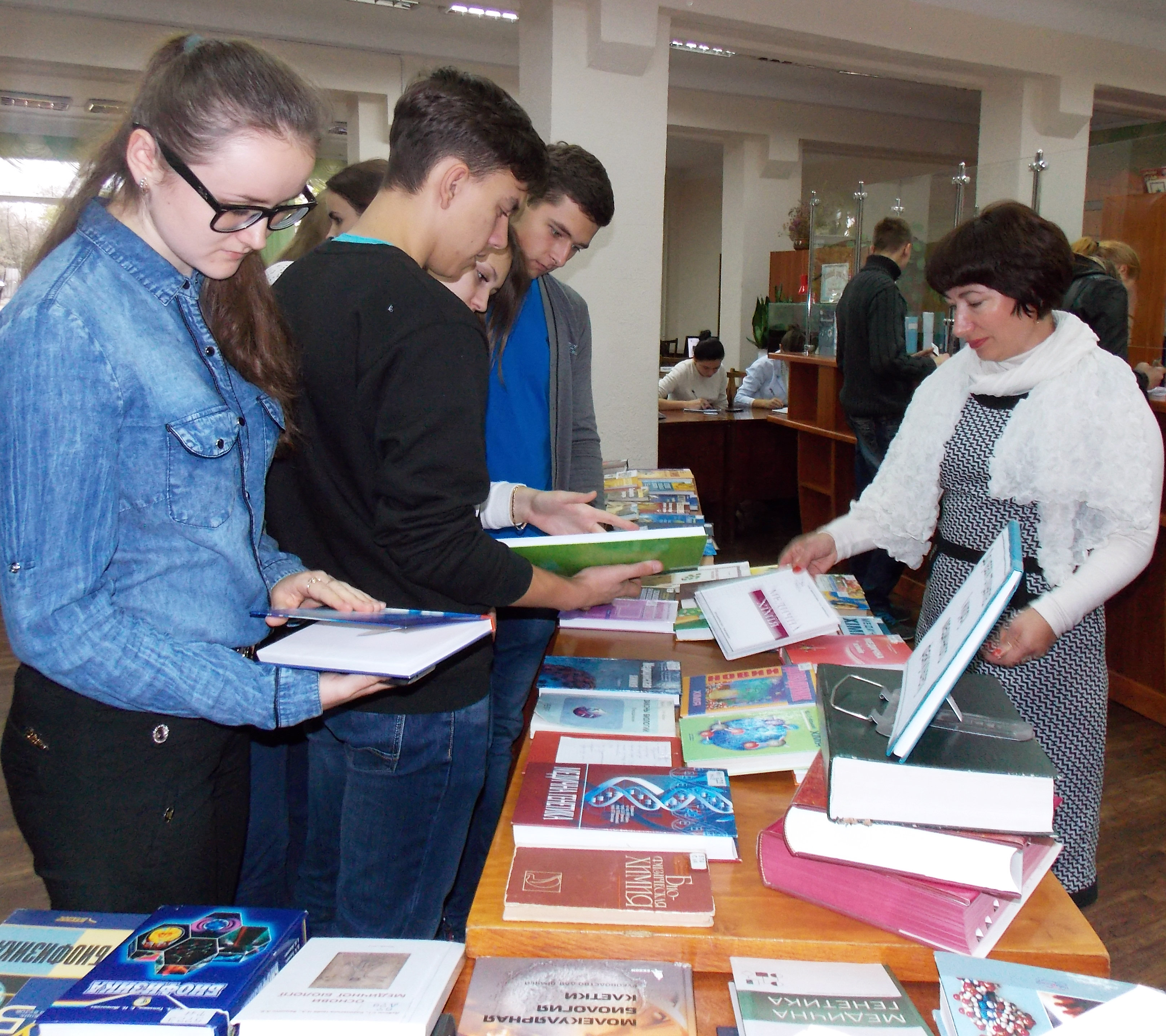 Директор бібліотеки з читачами